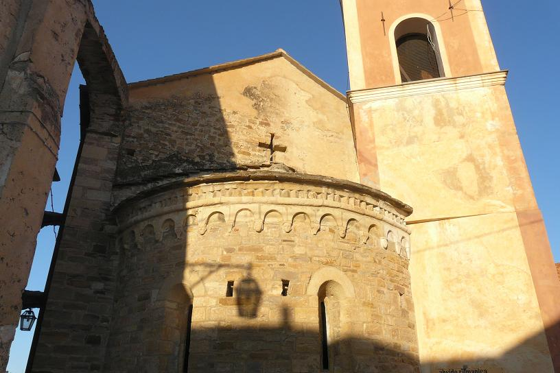 Chiesa di Santa Maria Assunta, Diano Castello, Liguria, Italia